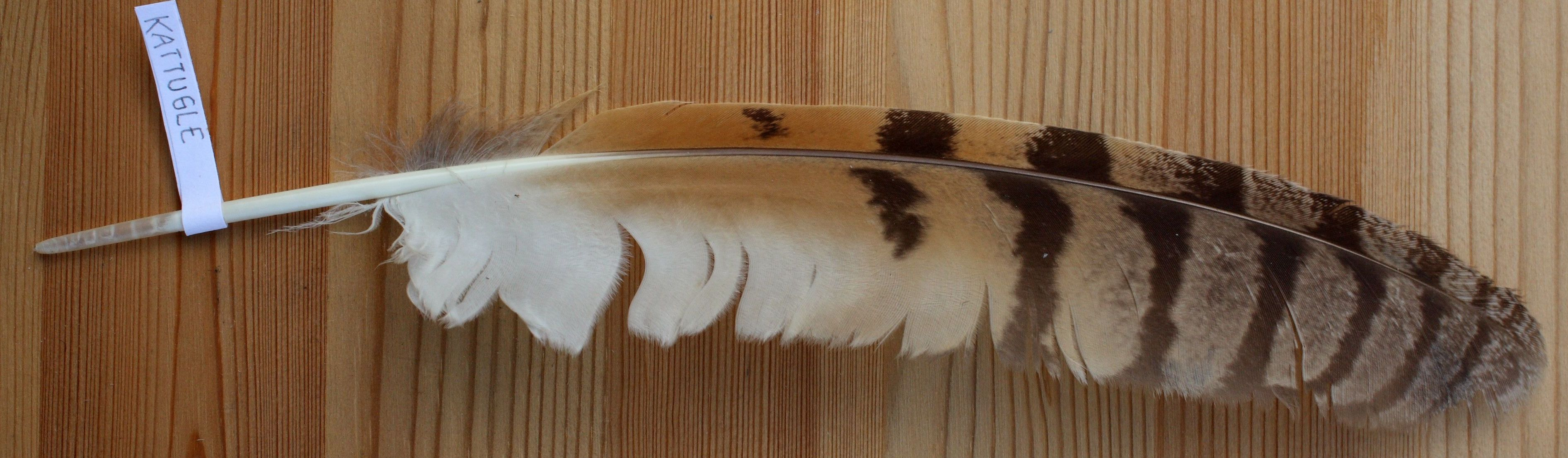 Kattugle høyre håndsvingfjær viser hvor mykt «pelsete» vingefjærene er på oversiden så de ikke skal lage turbulens men være lydløse.